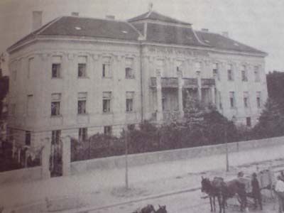 Photo of Dom Lavoslav Schwarz